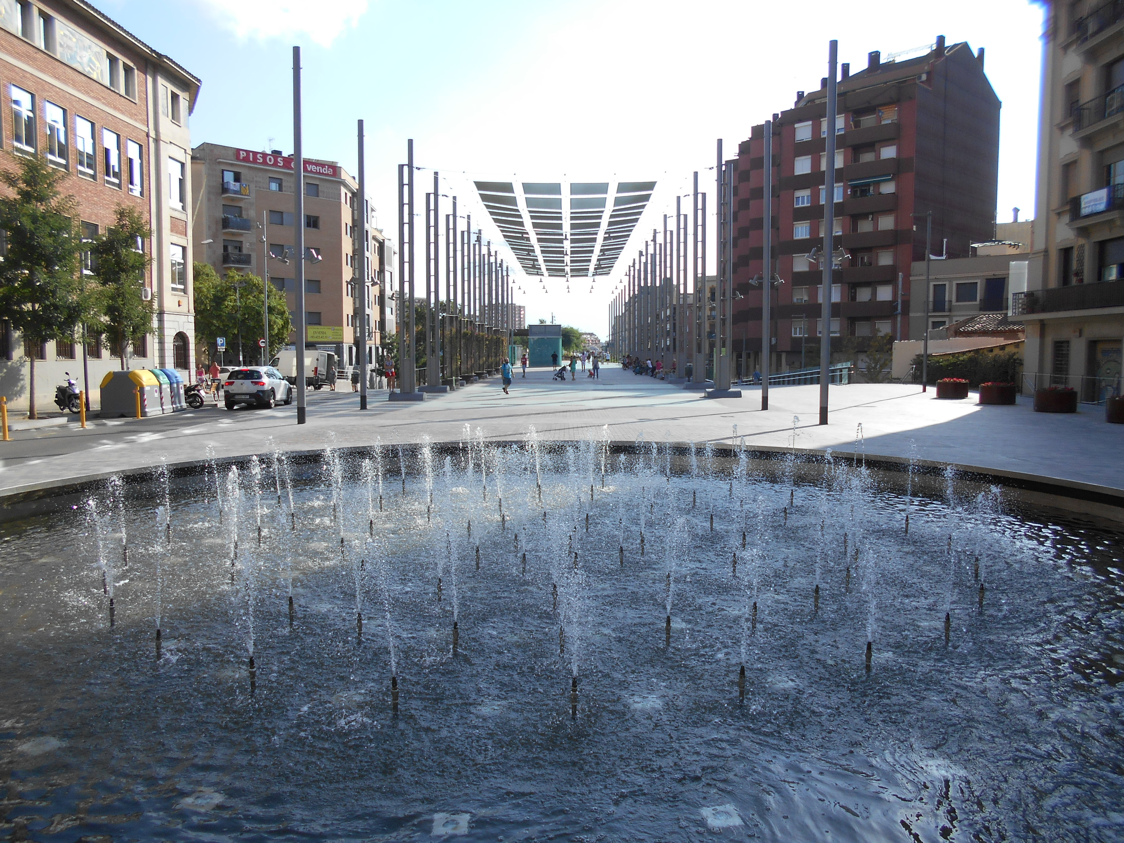 Jardines de la Rambla de Sants.